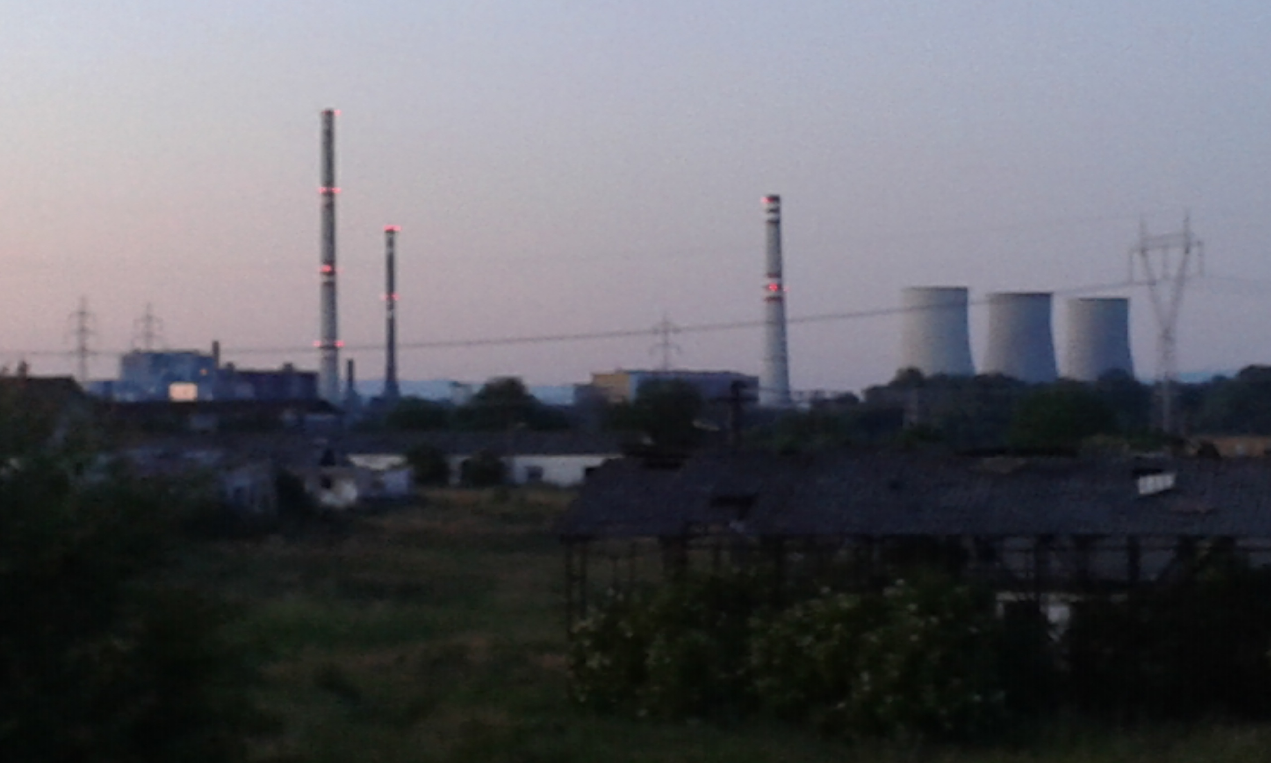 Bés felől fényképezve, esti kivilágításban